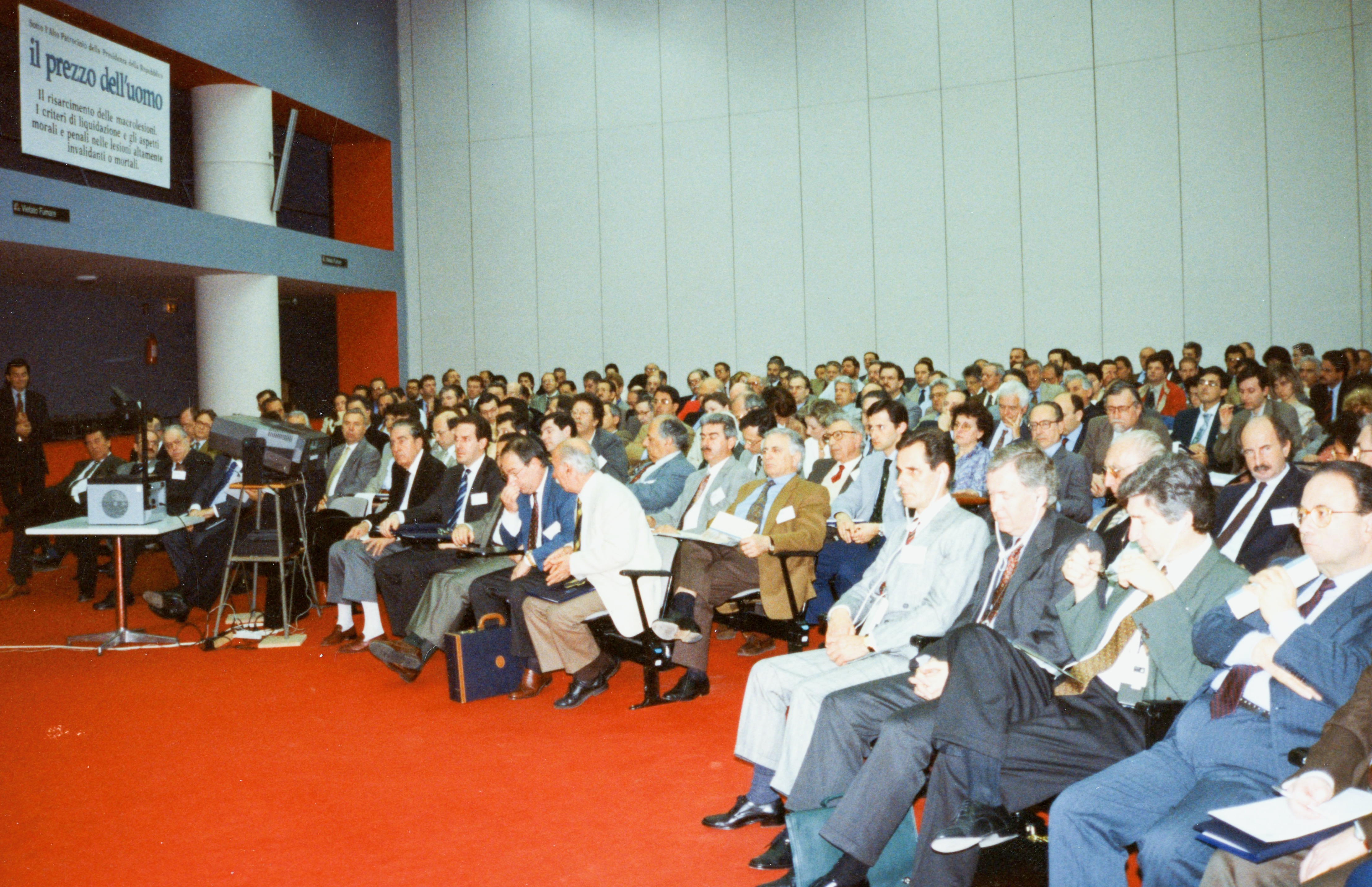 Sala Palazzo Congressi Pisa